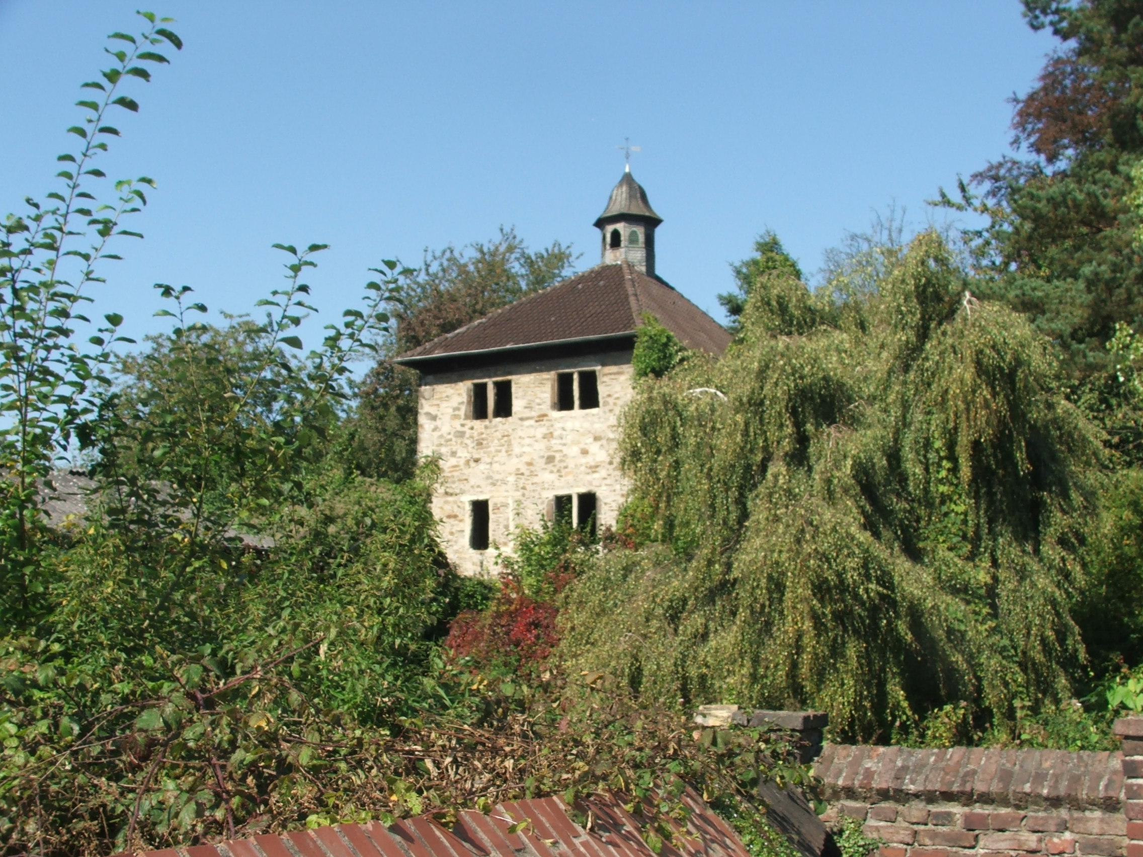 Wohnturm bei Haus Schoppe, Fröndenberg-Langschede, Germany